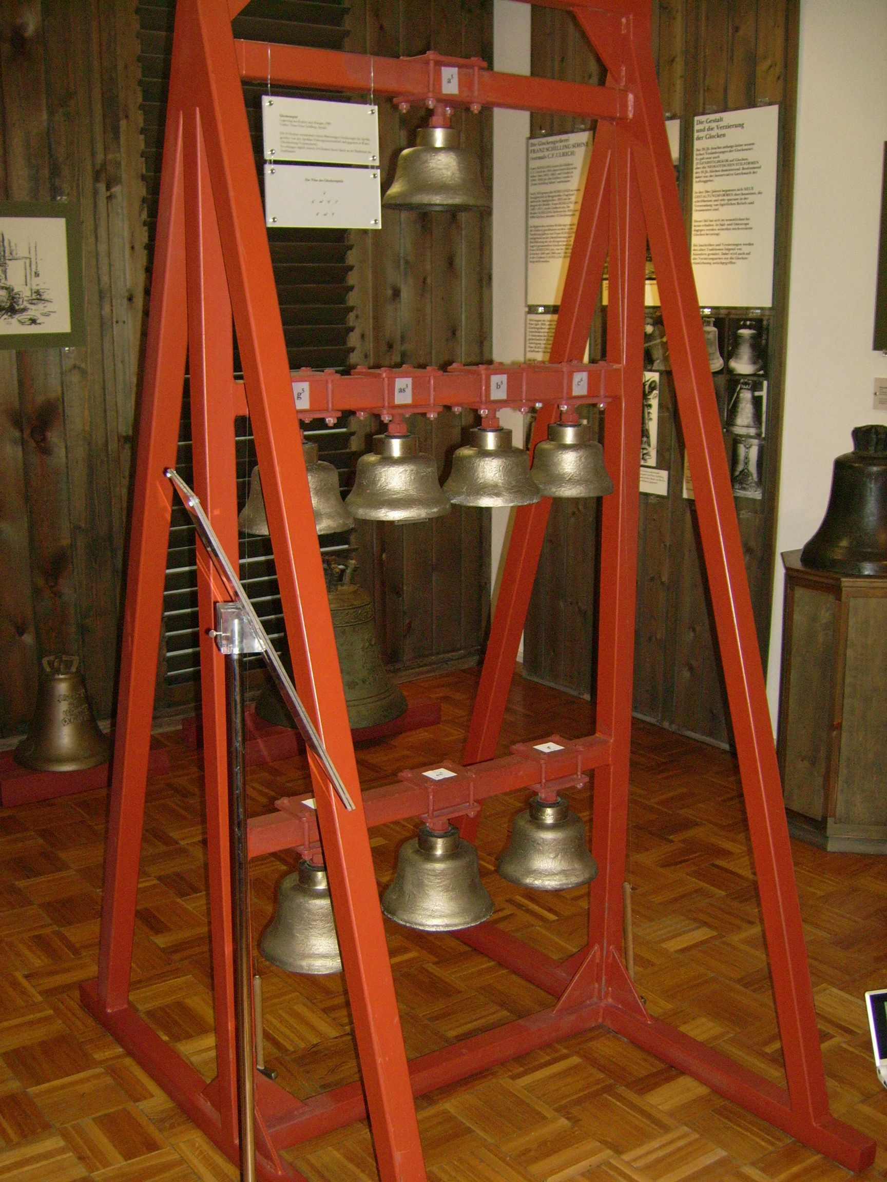 Glockenspiel